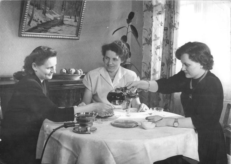 Kaffeetafel, Jenaer Glas Zentralbild Klein Blg-Qu 11Mot. 10.3.1955 Feuerfestes Jenaer Glas Vielseitig verwendbares und geschmackvoll geformtes Gebrauchsgeschirr bietet der Volkseigene Betrieb Jenaer Glaswerk Schott u. Gen. den Hausfrauen und erleichtert ihnen damit die Arbeit. Seit 90 Jahren bereits wird in Jena feuerfestes Glas hergestellt, doch die verschiedensten Möglichkeiten seiner Verwendbarkeit werden jetzt erst richtig ausgenutzt. Immer neue Formen werden im Volkseigenen Betrieb Jenaer Glaswerk Schott entwickelt, von der Kaffeemaschine über den Milchtopf, zu formschönen Tassen, Teekannen, Bratenschüsseln, Kartoffeldämpfern, Kompottschüsseln und vielem mehr. UBz: Der in der Sintrax-Kaffeemaschine bereitete Kaffee schmeckt den Gästen.